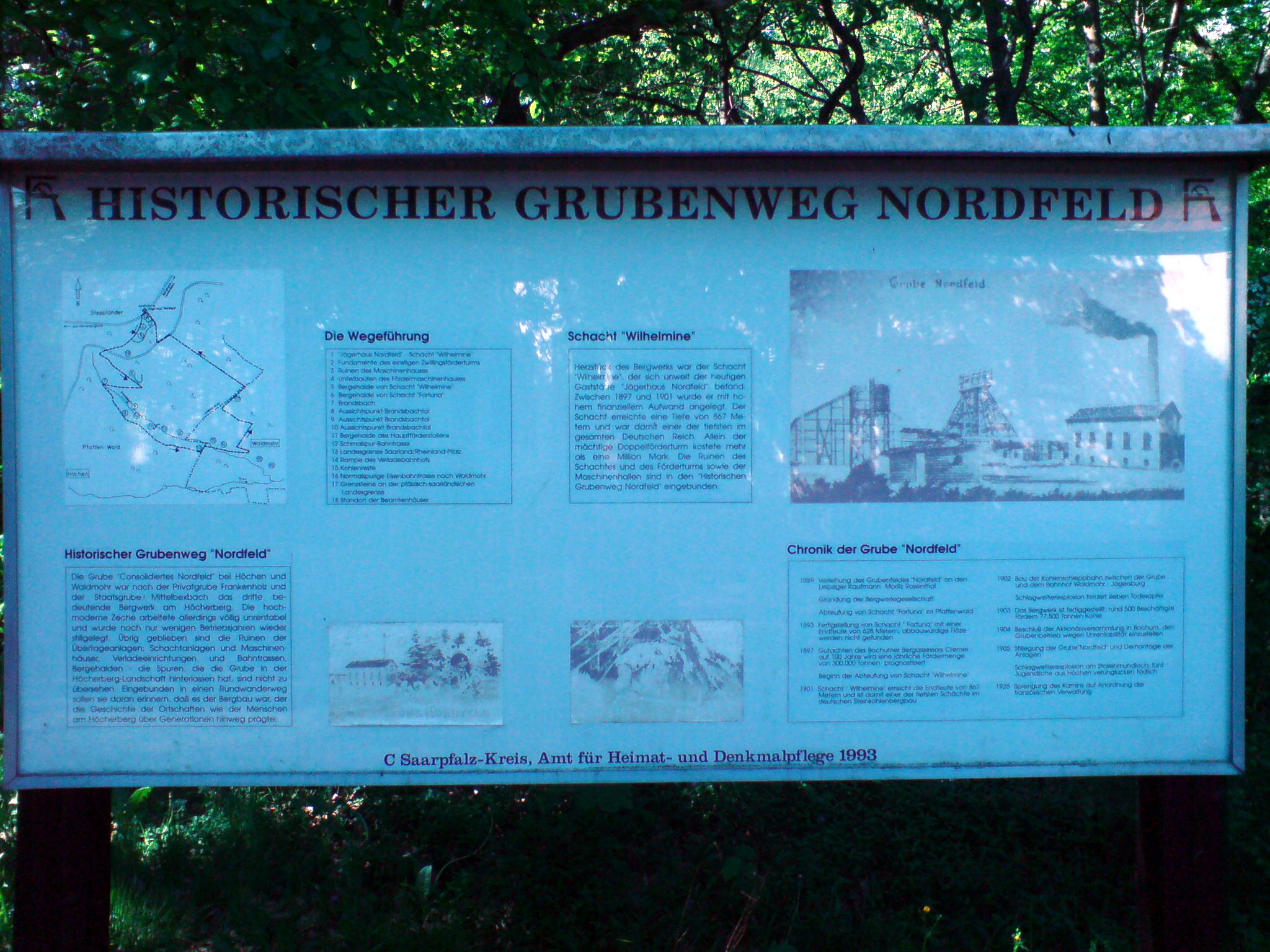 Aushangtafel an der ehemaligen Grube Nordfeld